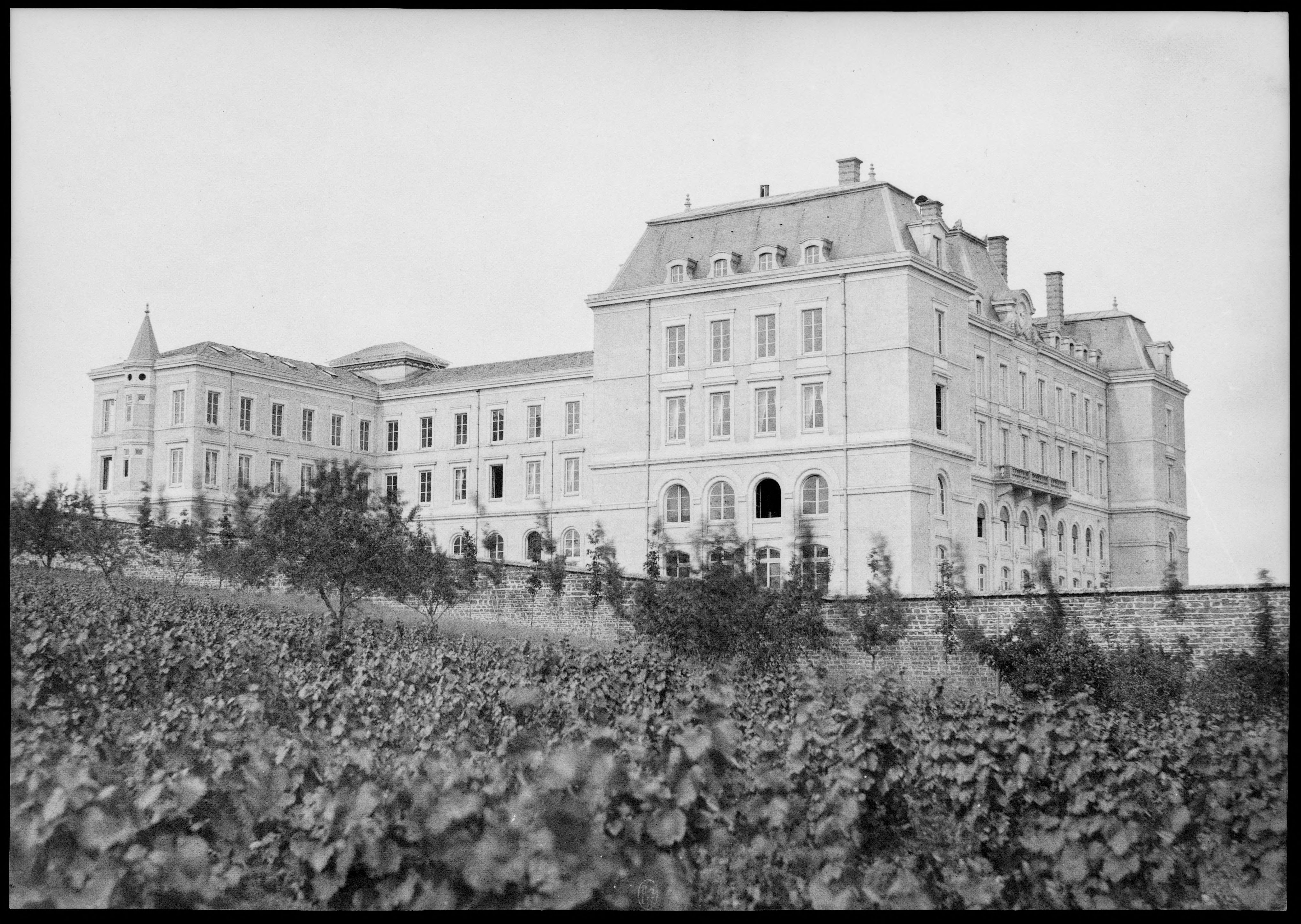 Lyon, le collège Saint-Rambert, actuel Lycée Jean-Perrin.